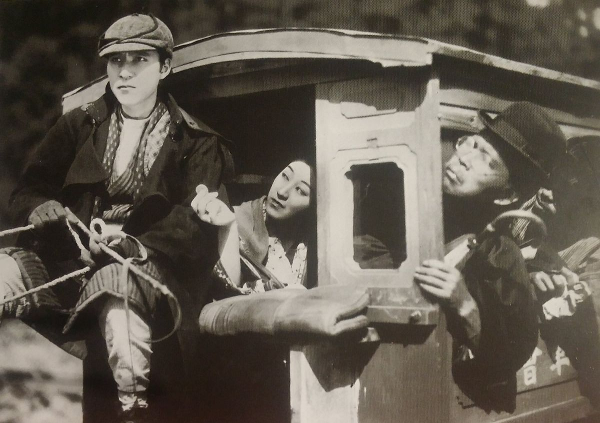 Tokihiko Okada (岡田 時彦) et Takako Irie (入江たか子) dans Taki no shiraito (滝の白糸) en 1933